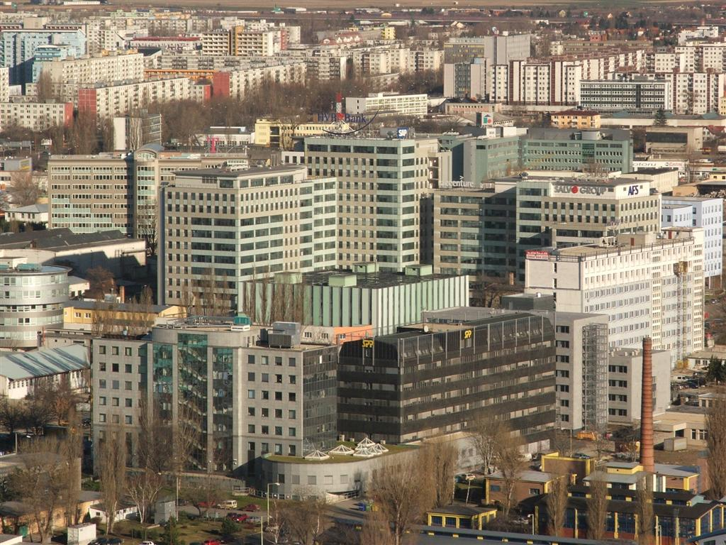 Business Center V (9.2.2007)